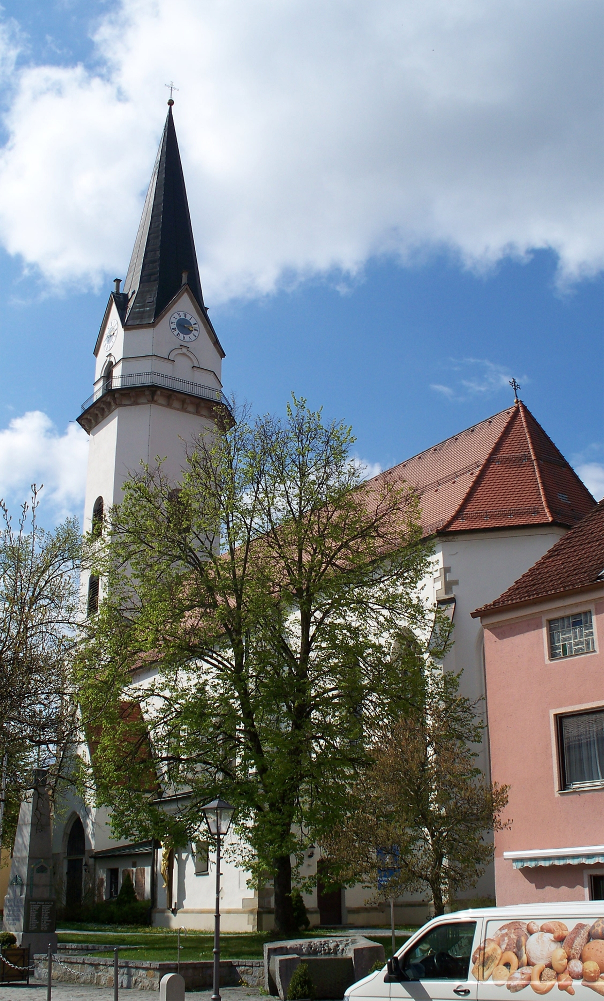 Die Pfarrkirche Mariä Himmelfahrt in Hofkirchen, Landkreis Passau, Bayern, Deutschland.